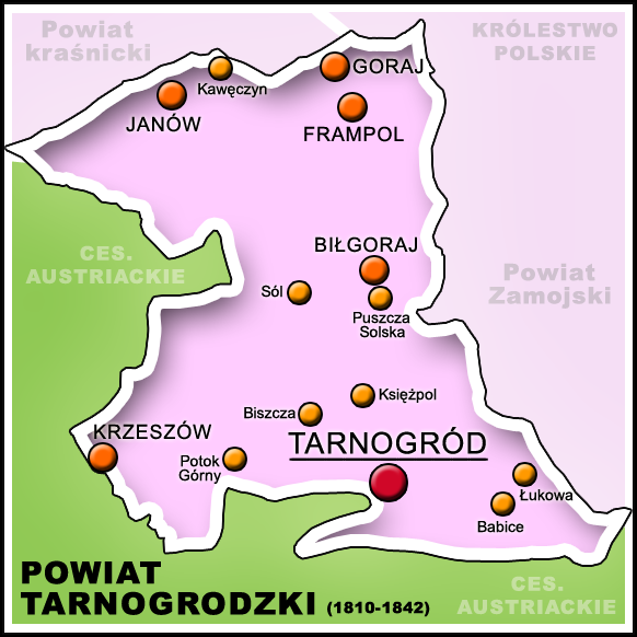 Powiat tarnogrodzki, mapa z 1810-1842, Tarnogród county, Poland, map from 1810-1842